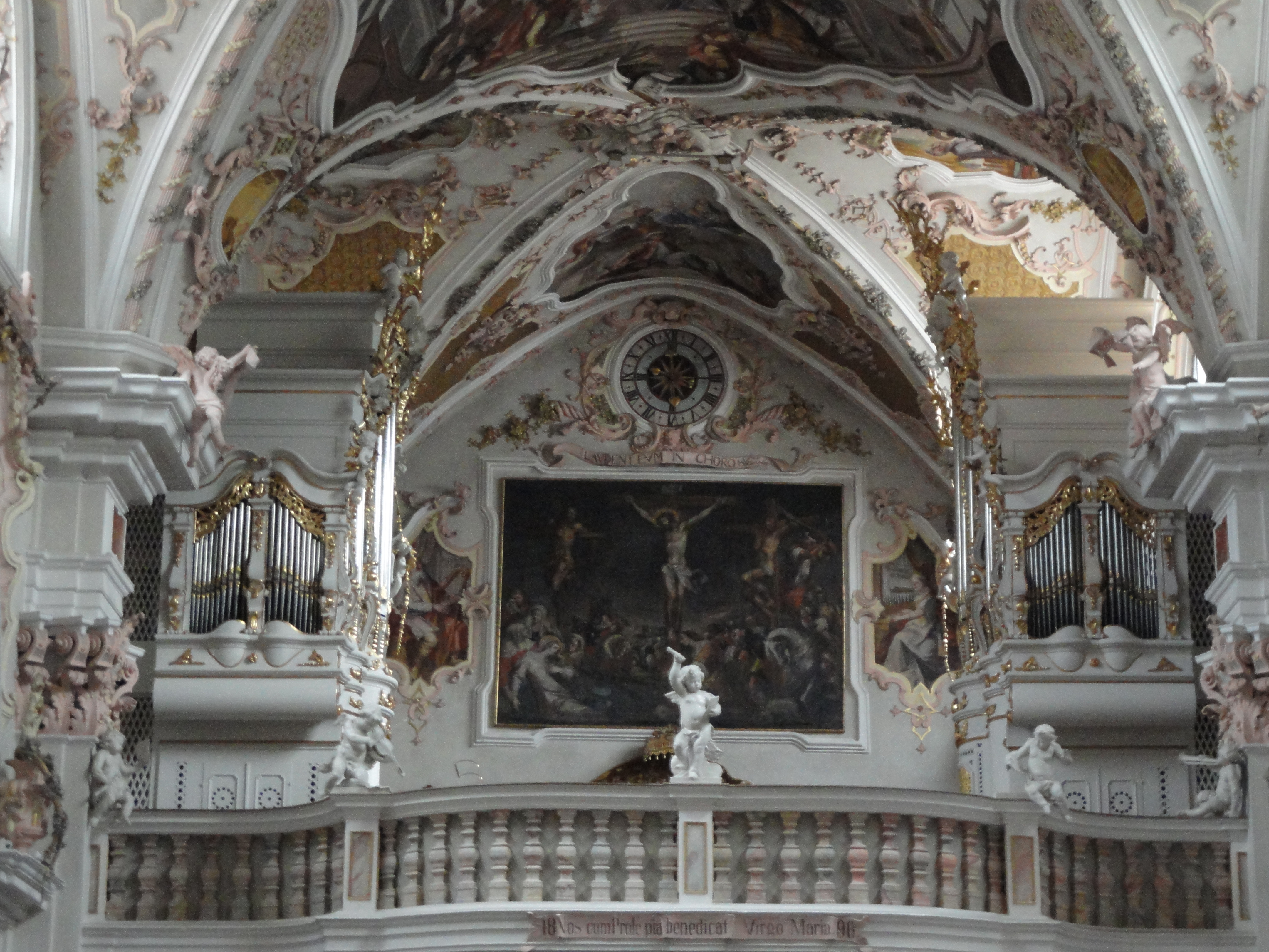 Metzler-Orgel Neustift Gesamtansicht